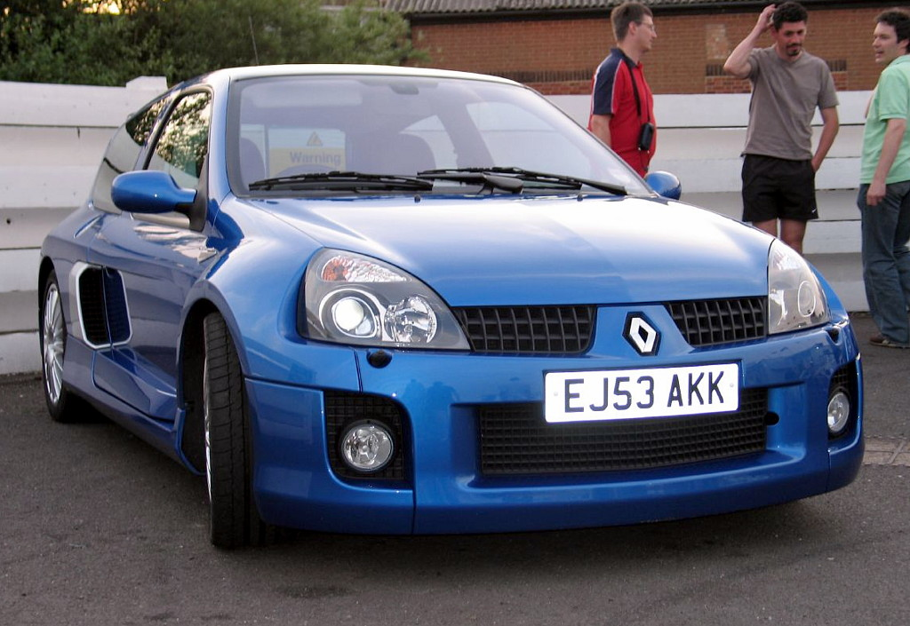 Renault Clio V6IMG_0185